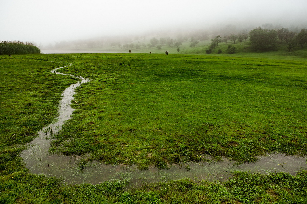 Temeleuți, monument al naturii amplasat în raionul Călărași, între satele Temeleuți și Vălcineț, ocolul silvic Călărași, Temeleuți, parcelele 12, 13 (cod MD-CL-rp-015)